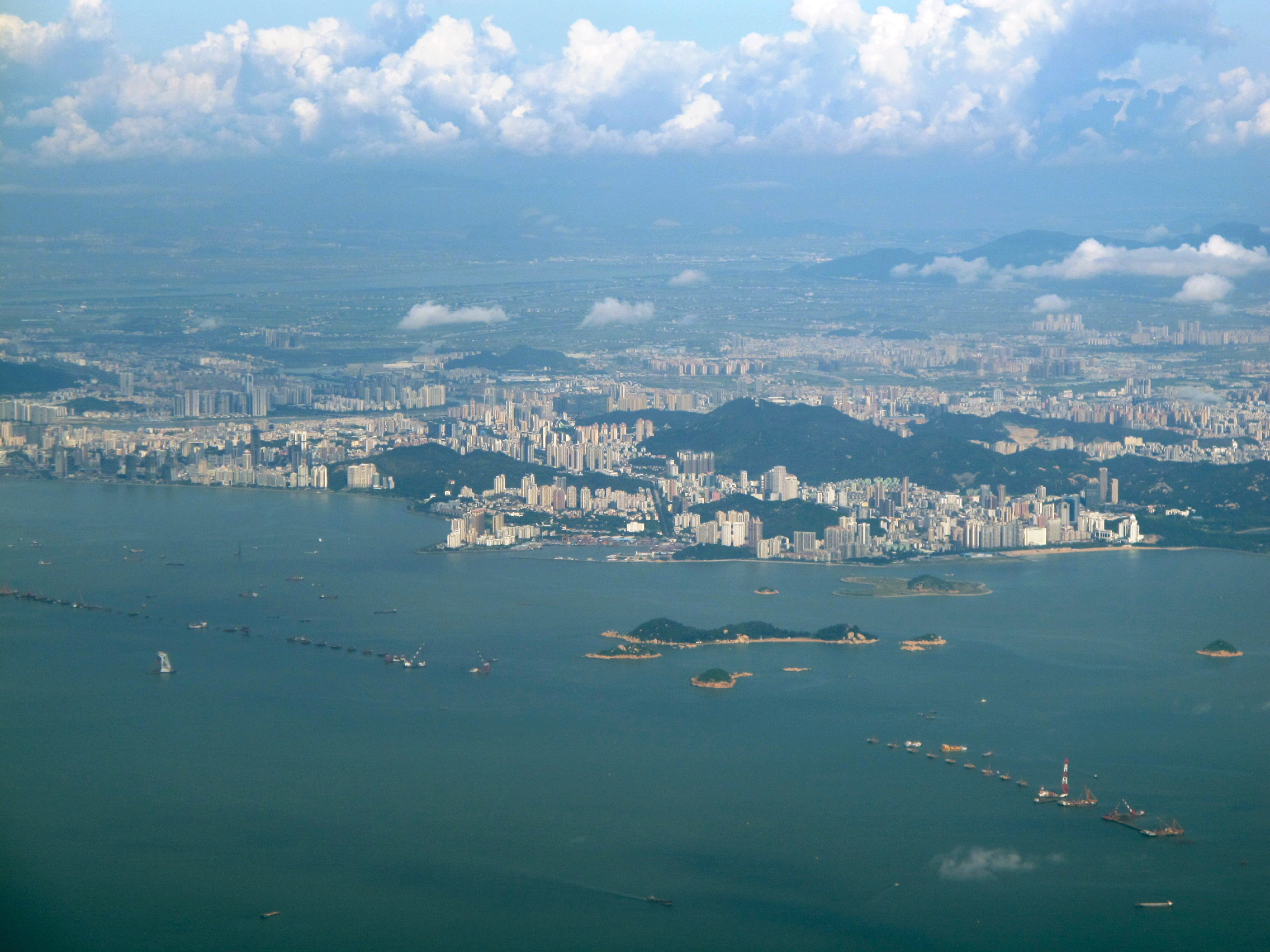 Zhuhai